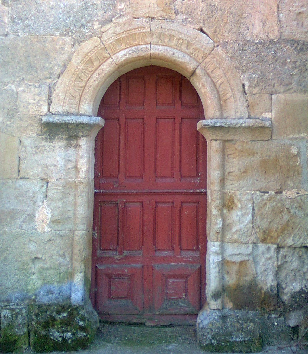 Puerta románica en la iglesia de Golpejas